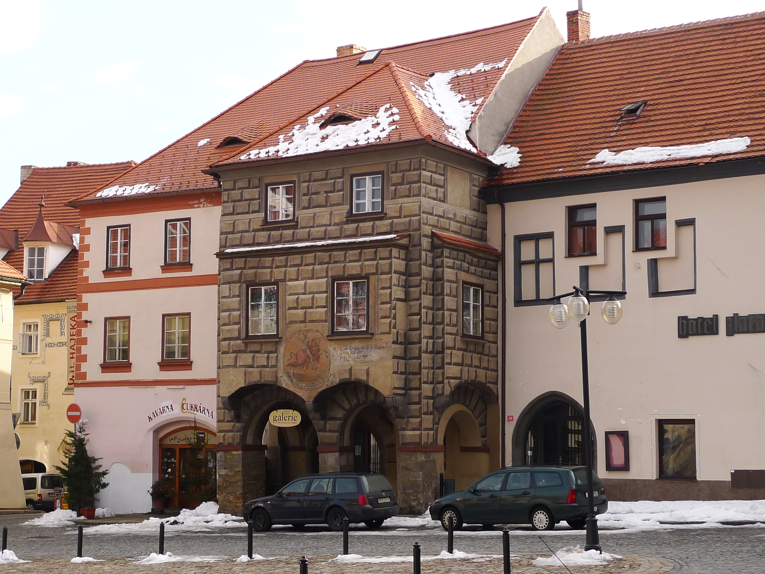 Měšťanský dům Rožmberský (Prachatice), roh Velkého nám. a Solní ul. 45, Prachatice